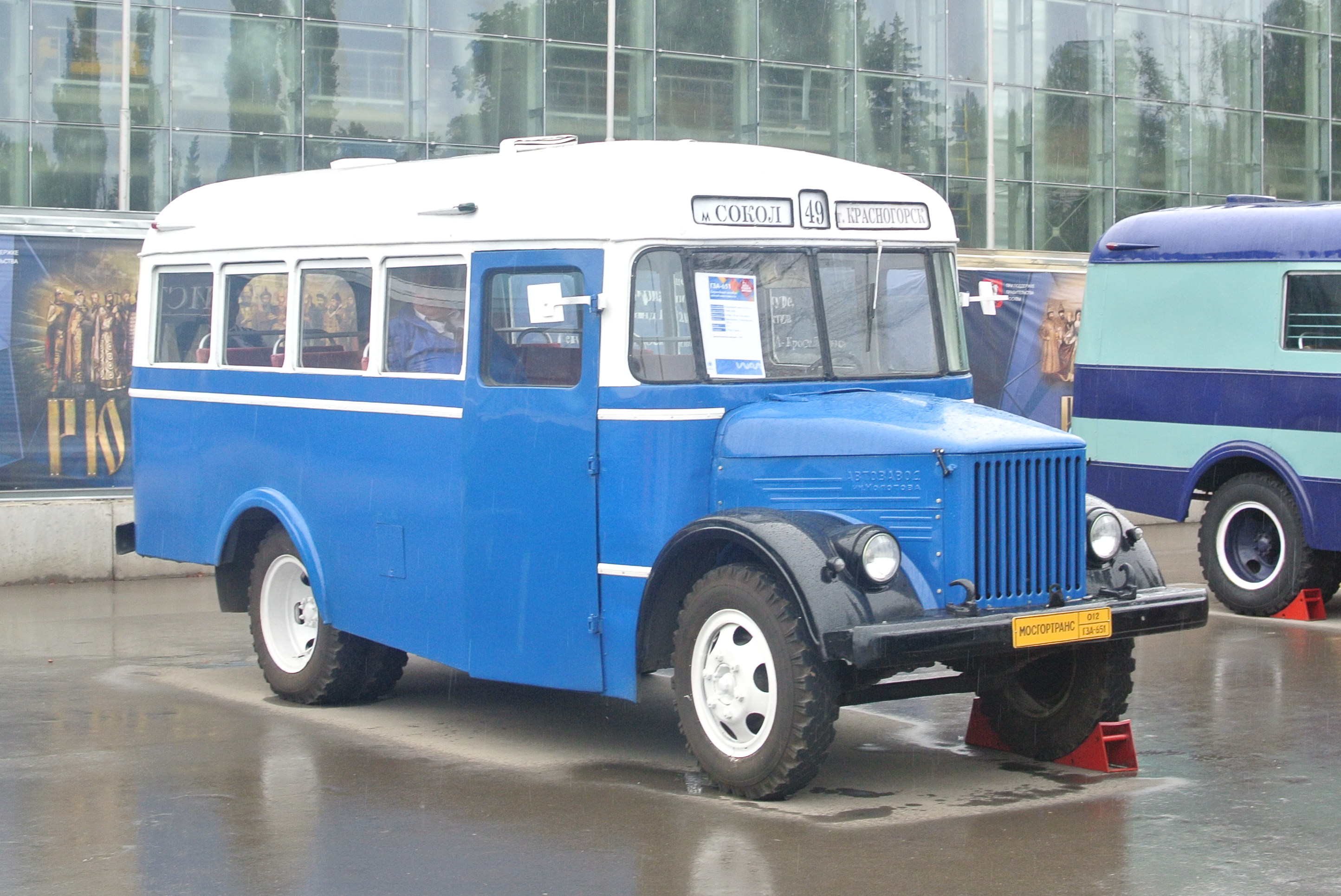 Автобус ГЗА-651 на экспозиции Мосгортранс на ВВЦ